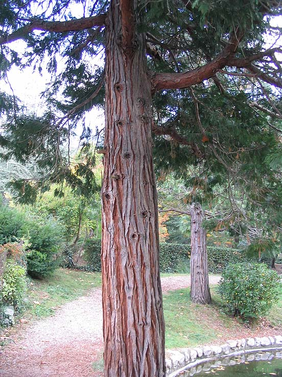 Calocedrus decurrens (calocèdre, cèdre à encens) Photo prise à Vernet-les-Bains (66) en octobre 2004 Jean Tosti 2004